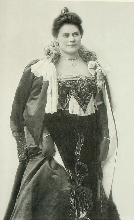 Sara Braun Hamburguer, viuda de Nogeira, Punta Arenas, hacia 1900.